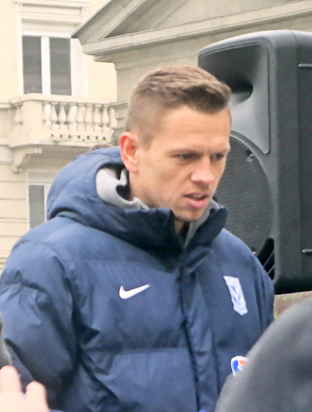 Matúš Putnocký, piłkarz Lecha Poznań podczas akcji "Pierwszy Gwizdek" na Placu Wolności w Poznaniu